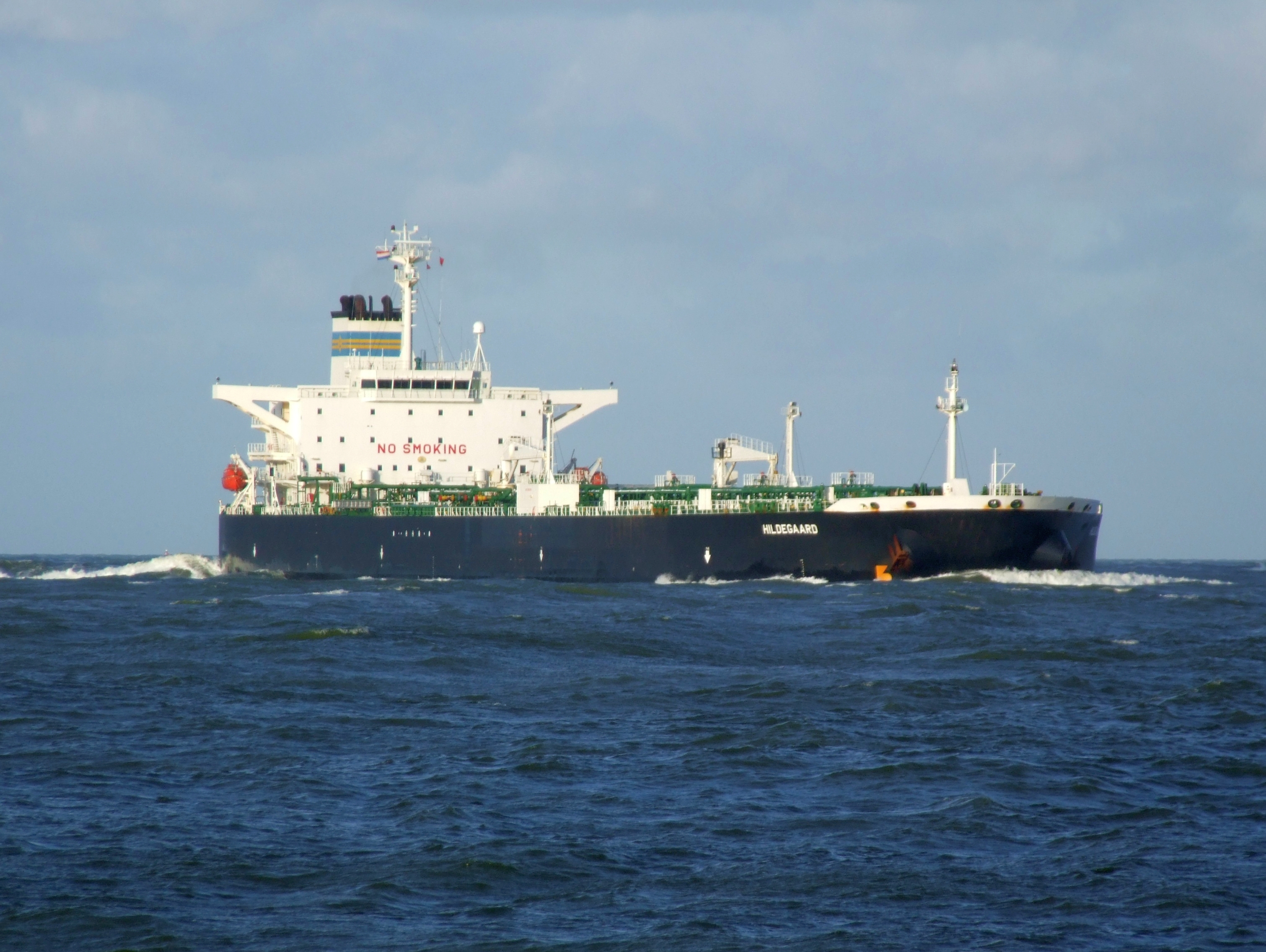 Hildegaard IMO 9194139 approaching Port of Rotterdam, Holland 12-Dec-2006.